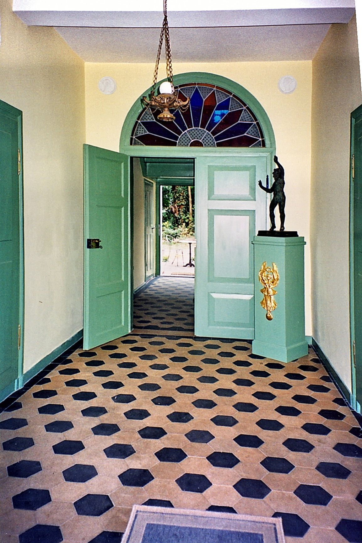 Vestibul des Palais Minckwitz in Dessau